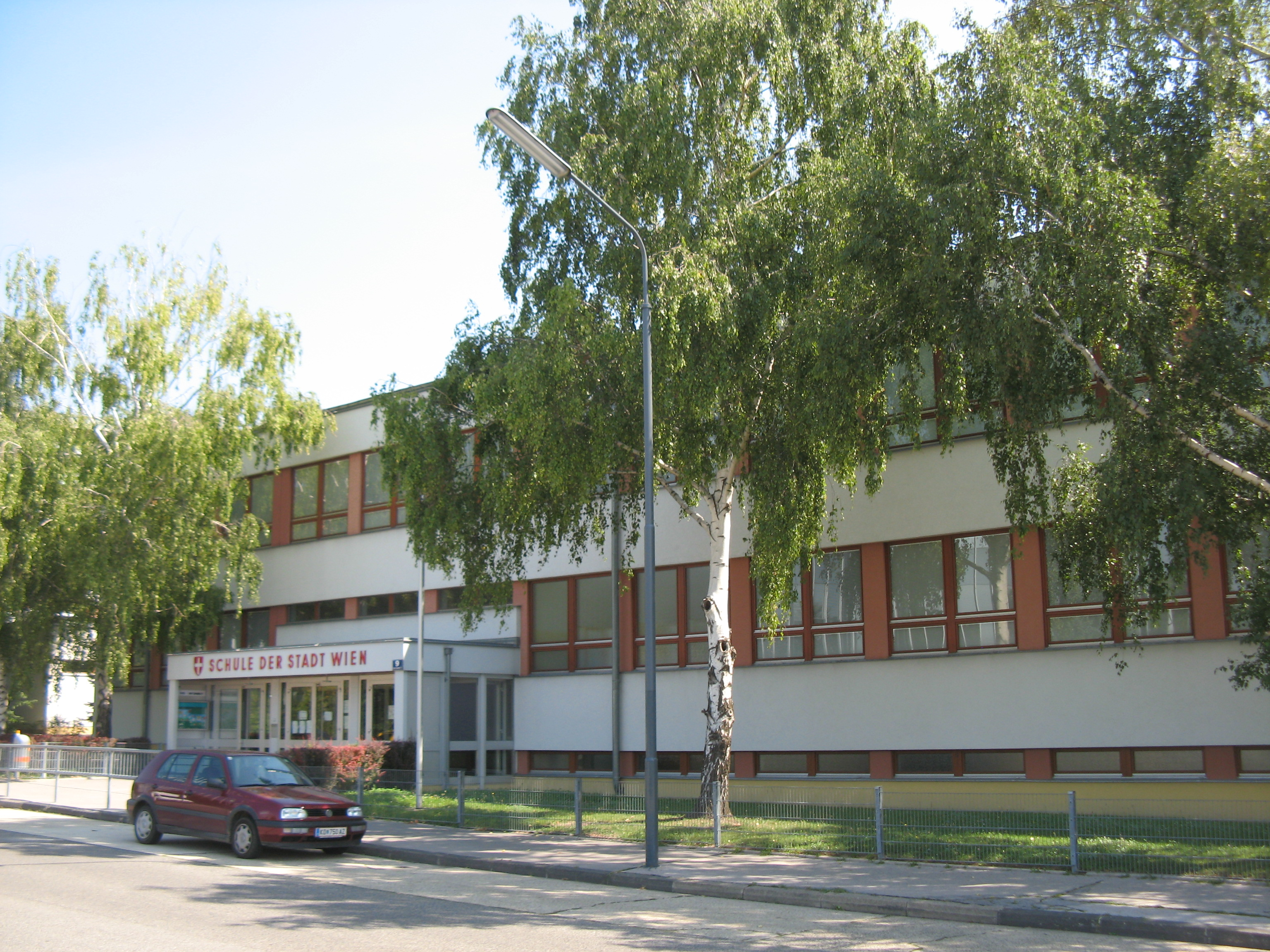 Volksschule (1968-69), Ada-Christen-Gasse 9, Wien-Favoriten